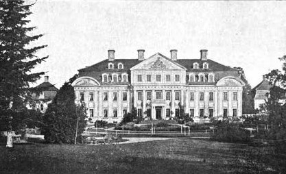 Herrenhaus Diekhof (Schloss Diekhof), scan aus: Friedrich Schlie: Die Kunst- und Geschichts-Denkmäler des Grossherzogthums Mecklenburg-Schwerin. V. Band: Die Amtsgerichtsbezirke Teterow, Malchin, Stavenhagen, Penzlin, Waren, Malchow und Röbel. Schwerin, 1902, S. 44